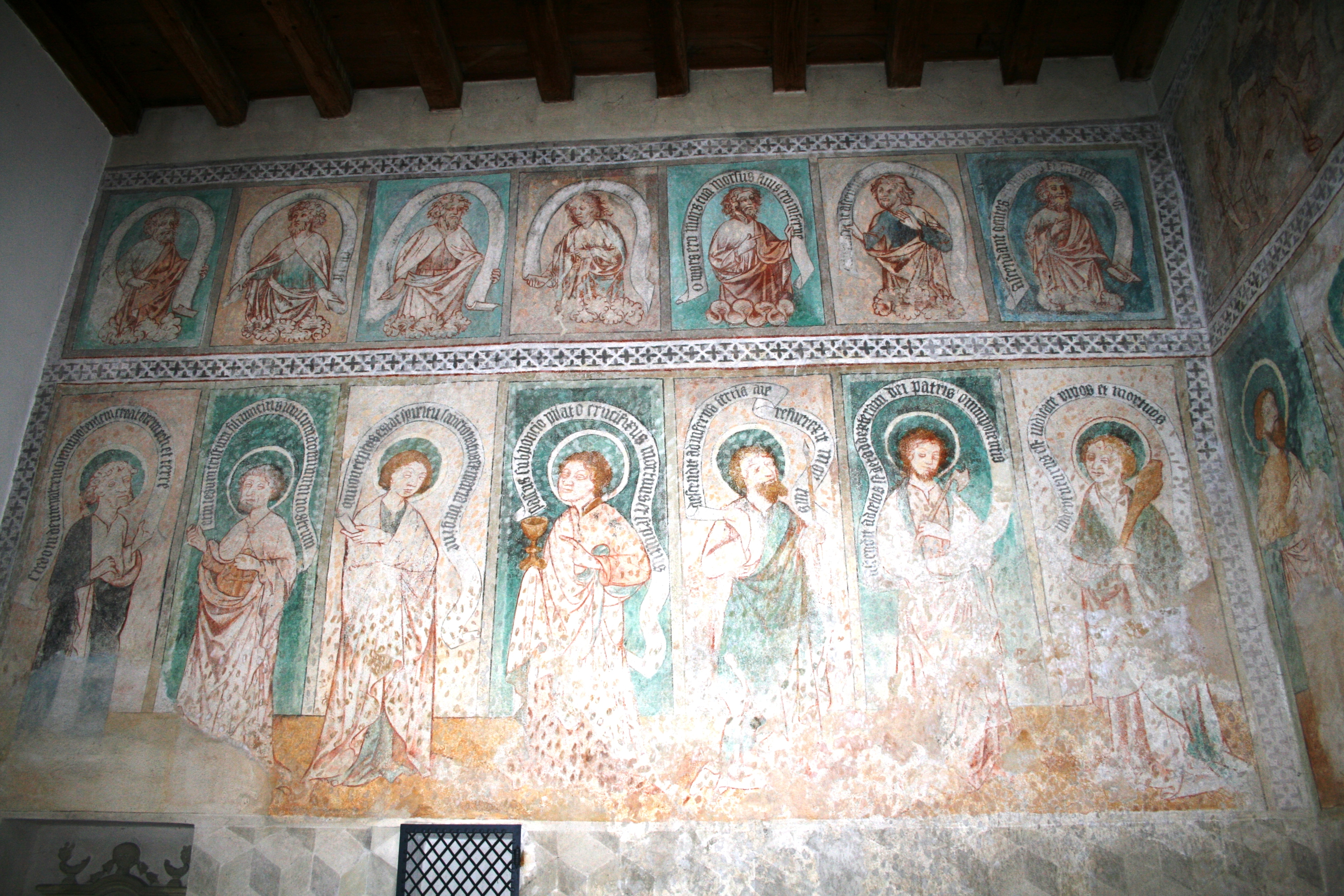 Nördliche Wand der Freskenkapelle Birmenstorf AG, Schweiz